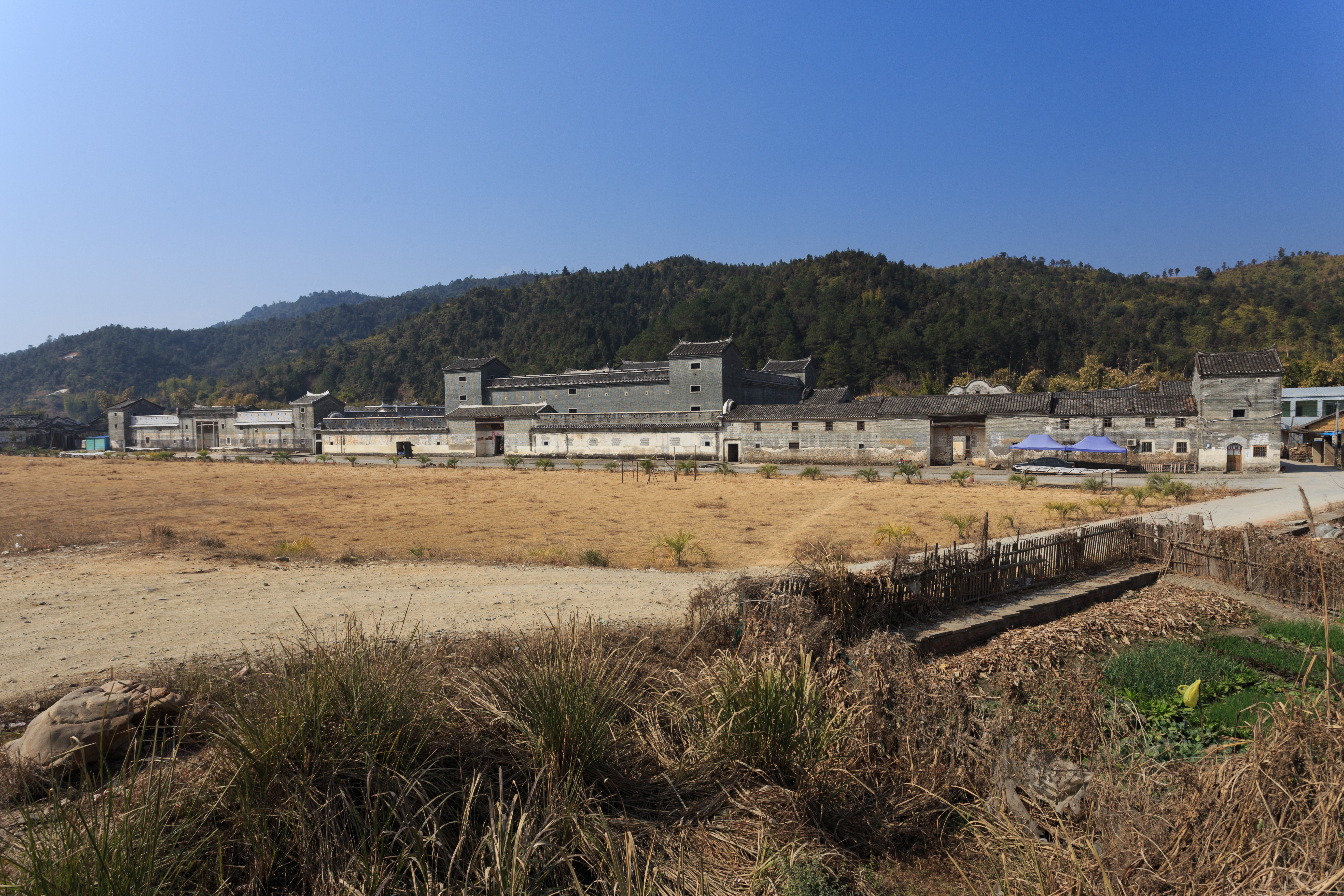 广东省始兴县隘子镇满堂围—— 远眺